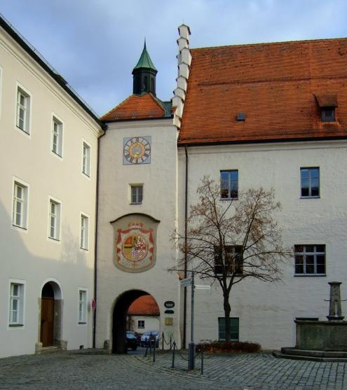 Eingangstor zum Herzogschloss Straubing